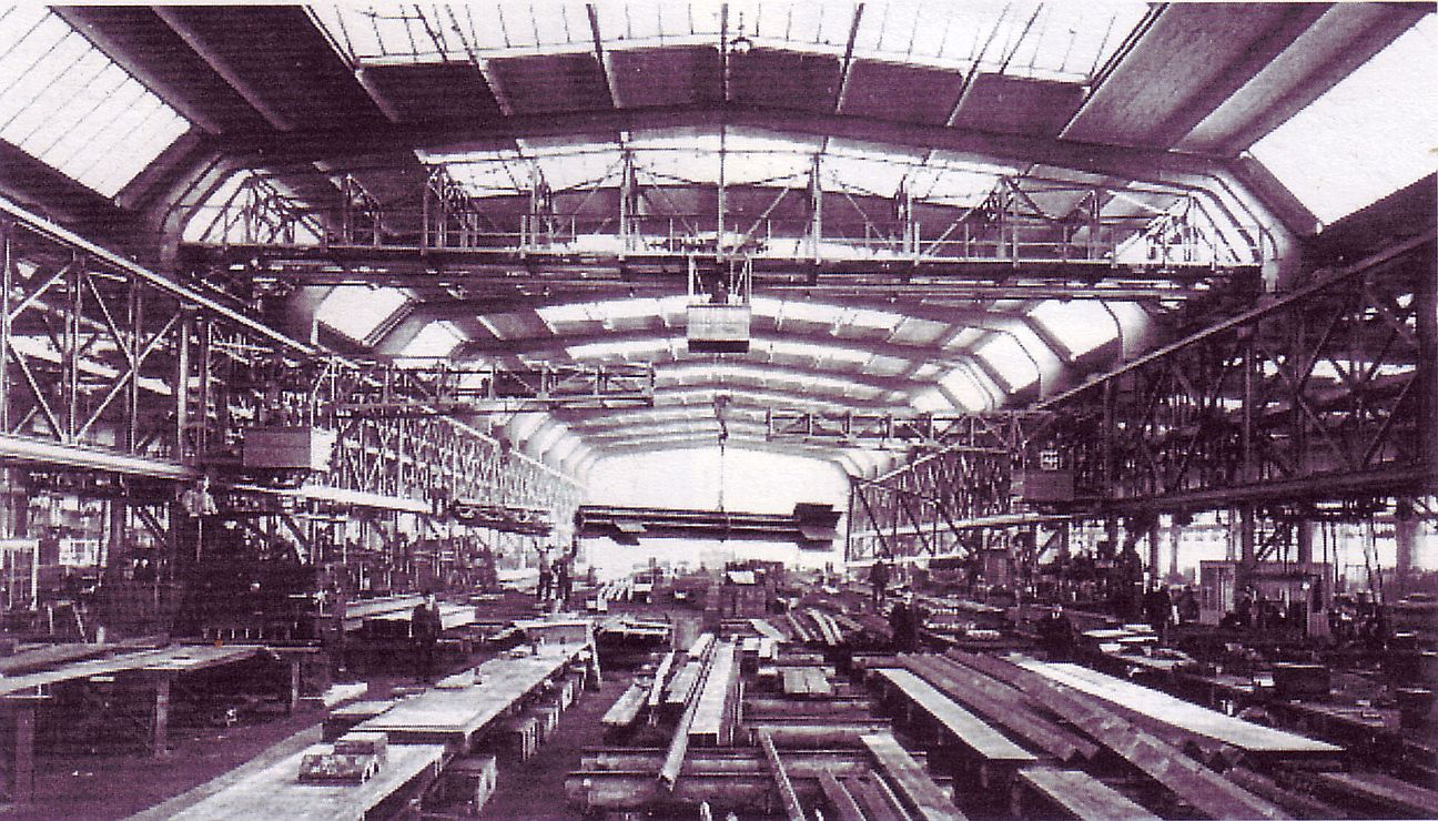 Erste Großraumwerkstätte im MAN Werk Gustavsburg mit einer Fläche von 14.400 qm